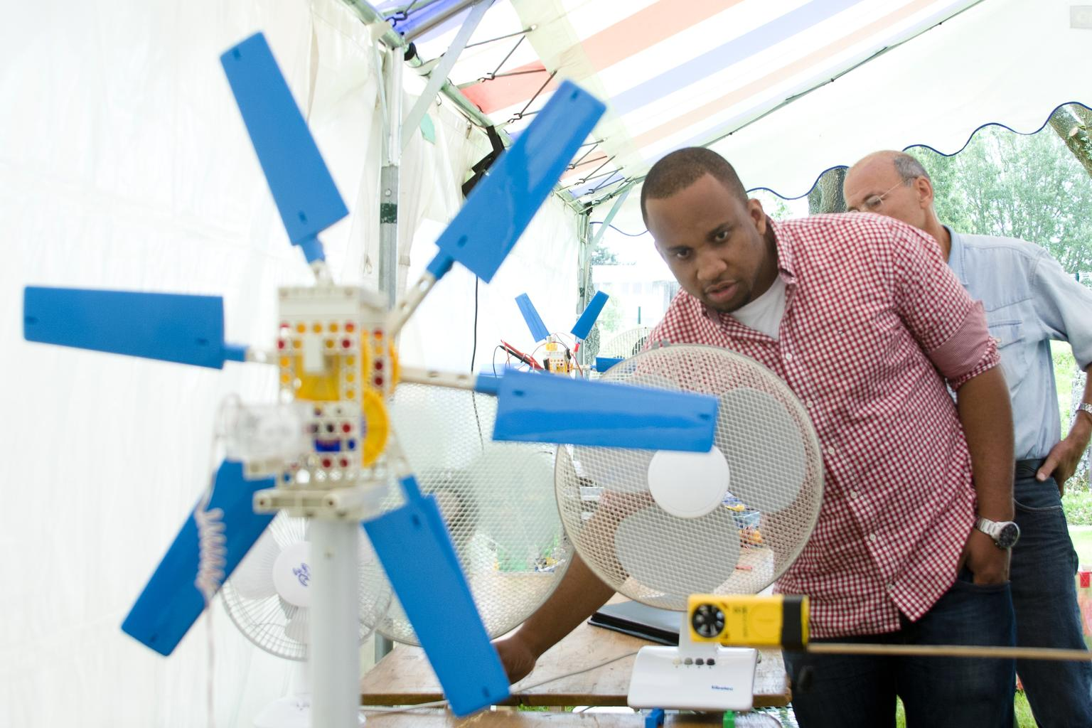 Laboratoire de l'École polytechnique, modèle d'éolienne au Climate-KIC 2012.